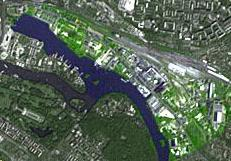 Luftbild Berlin Rummelsburg nebenliegende Stadtteile abgedunkelt.